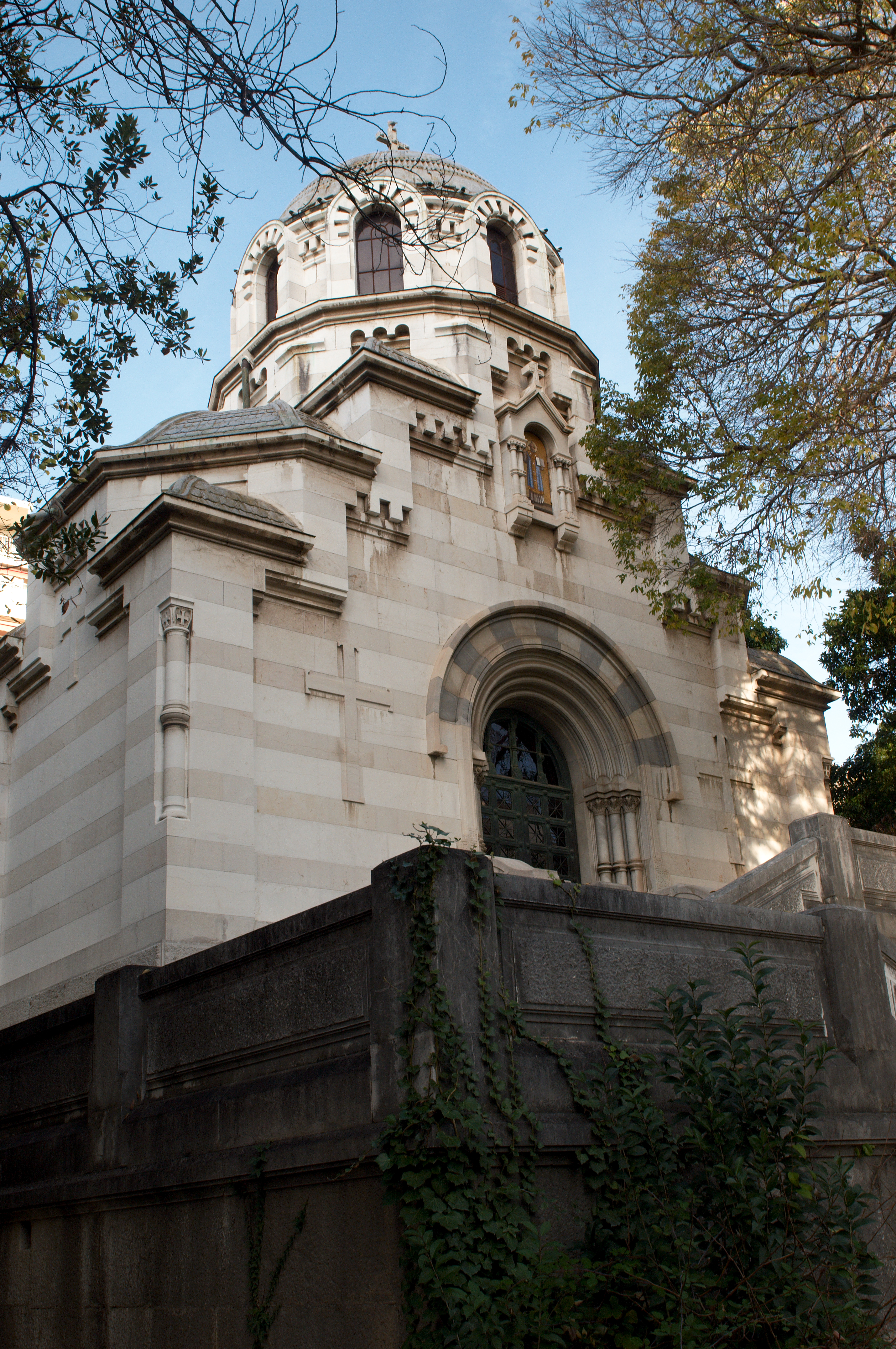 Église russe à Nice, chapelle où le tsarévitch Nicolas Alexandrovitch est enterré.